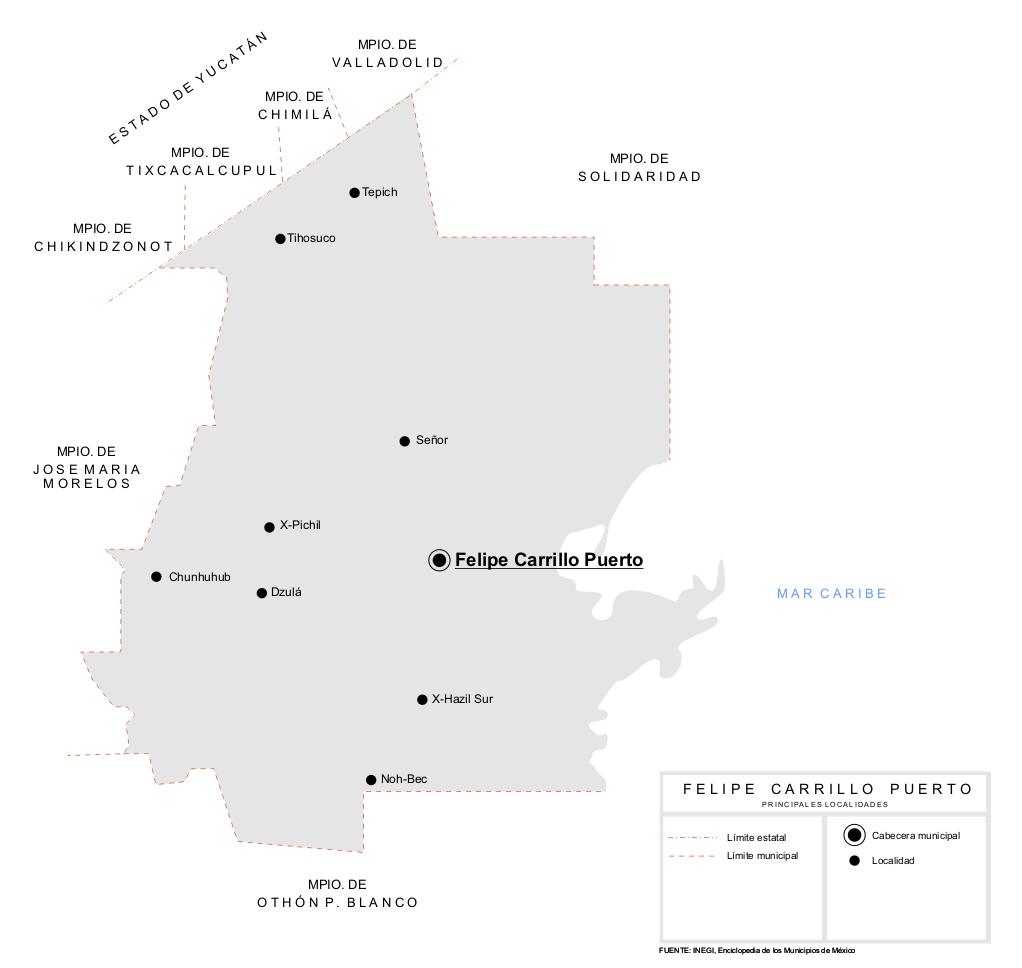 Mapa de las principales localidades del Municipio de Felipe Carrillo Puerto en el estado de Quintana Roo, México.